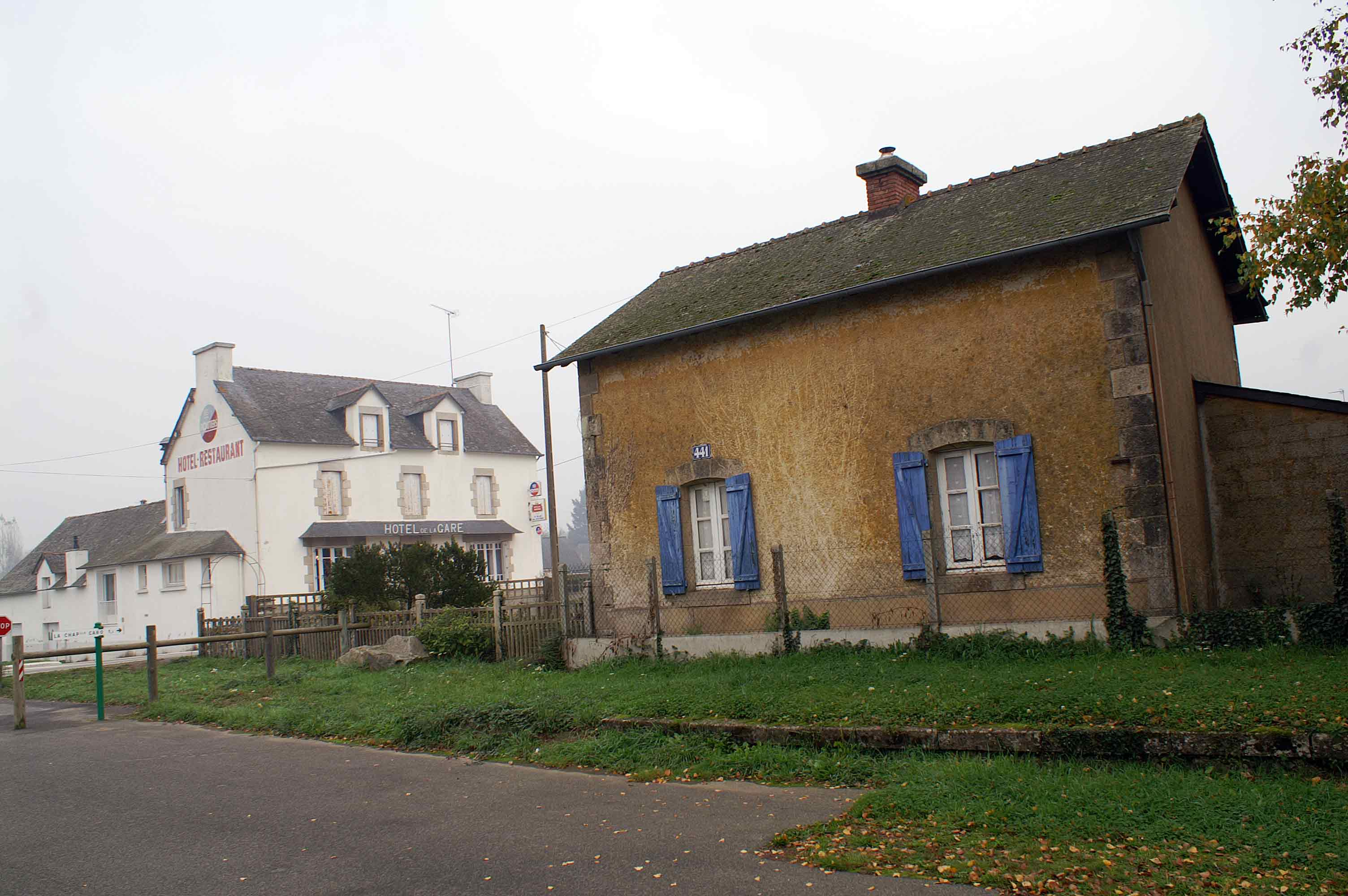 La gare a disparue, il reste la maison du garde barrière et l'hôtel de la gare, à côté de la Voie Verte qui a remplacé la ligne de chemin de fer.